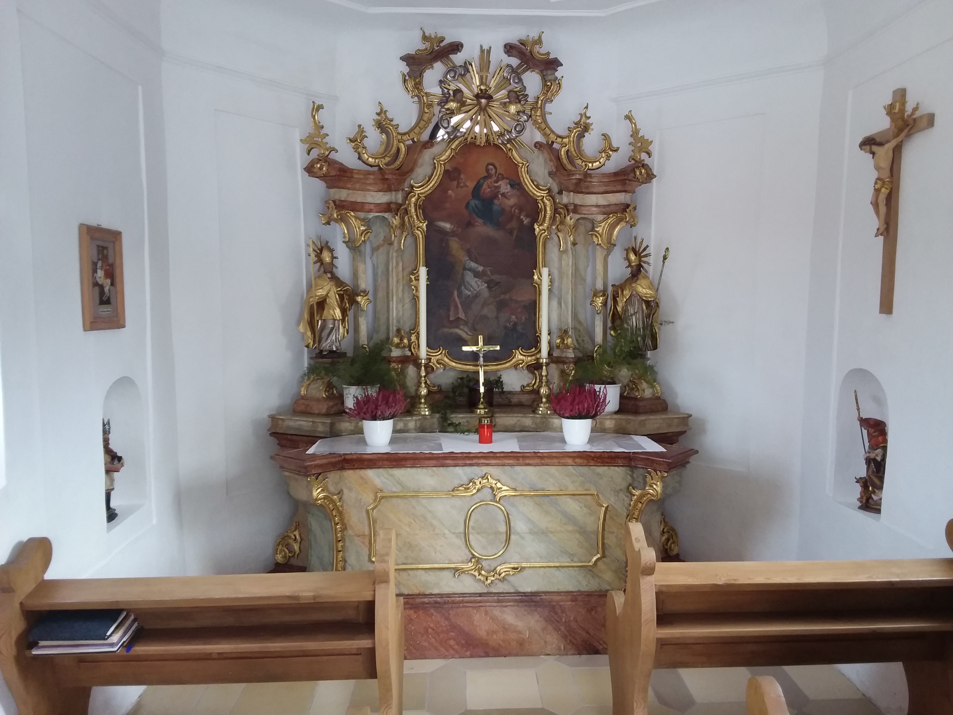 Kapelle St. Ulrich bei der Labermühle, Ortsteil von Deining im Landkreis Neumarkt in der Oberpfalz, Bayern, Altar